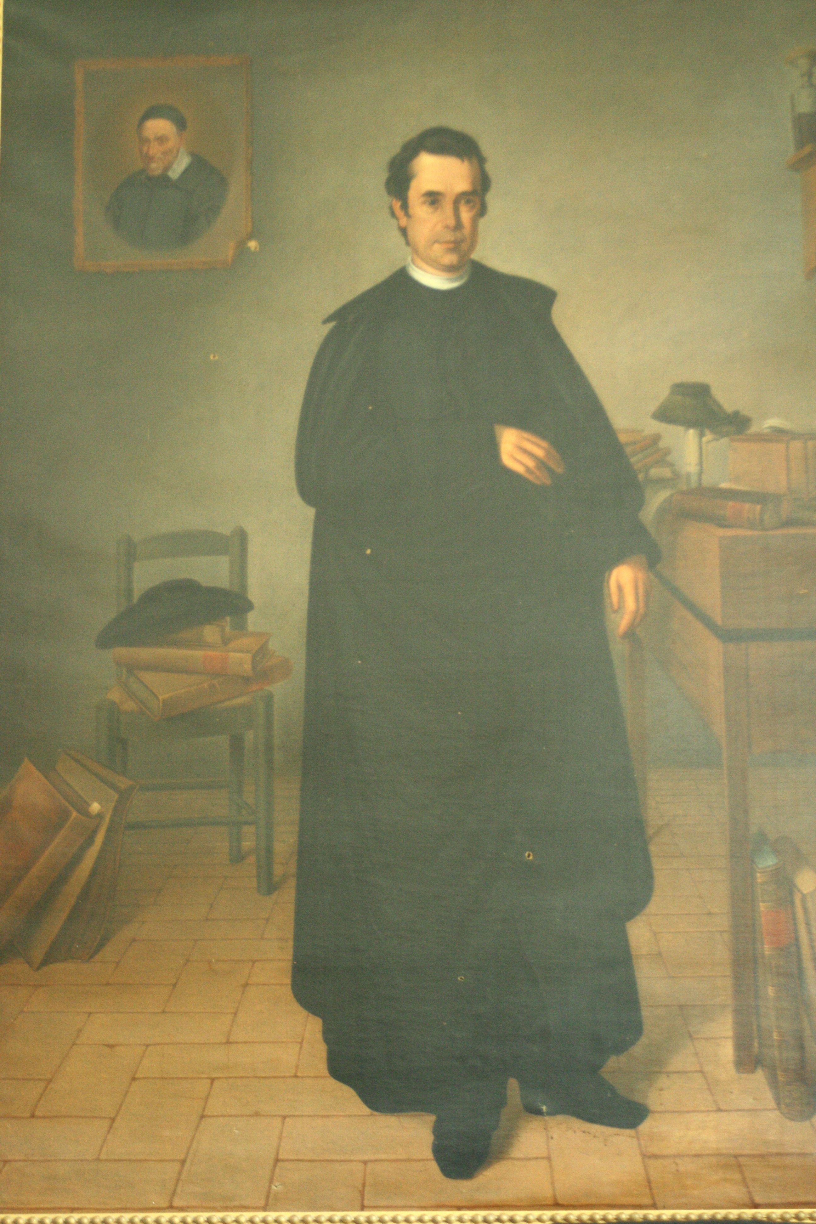 Retrat de Julián González de Soto ubicat al depatx del director de l'IES Ramon Muntaner.